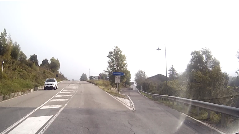 Vaglia, frazione Tagliaferro